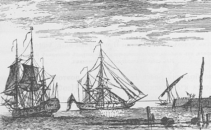 Бомбардирский корабль.